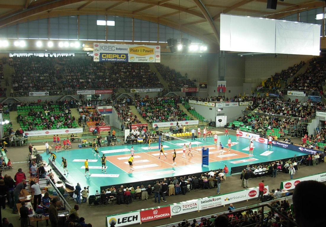 Hala Łuczniczka w Bydgoszczy. Mecz ligowy siatkówki mężczyzn Delecta (Chemik) Bydgoszcz - Skra Bełchatów.